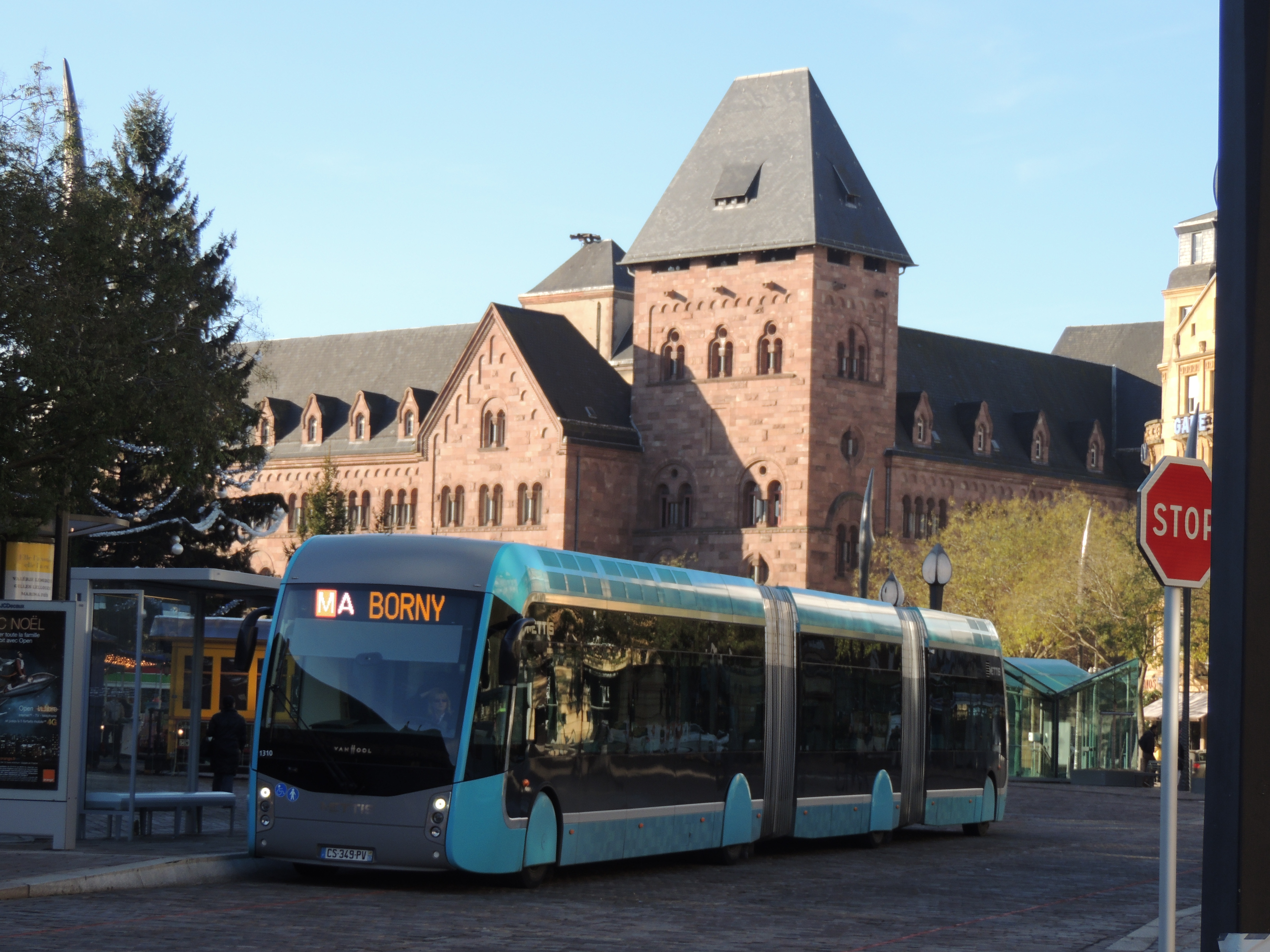 Van Hool Metz